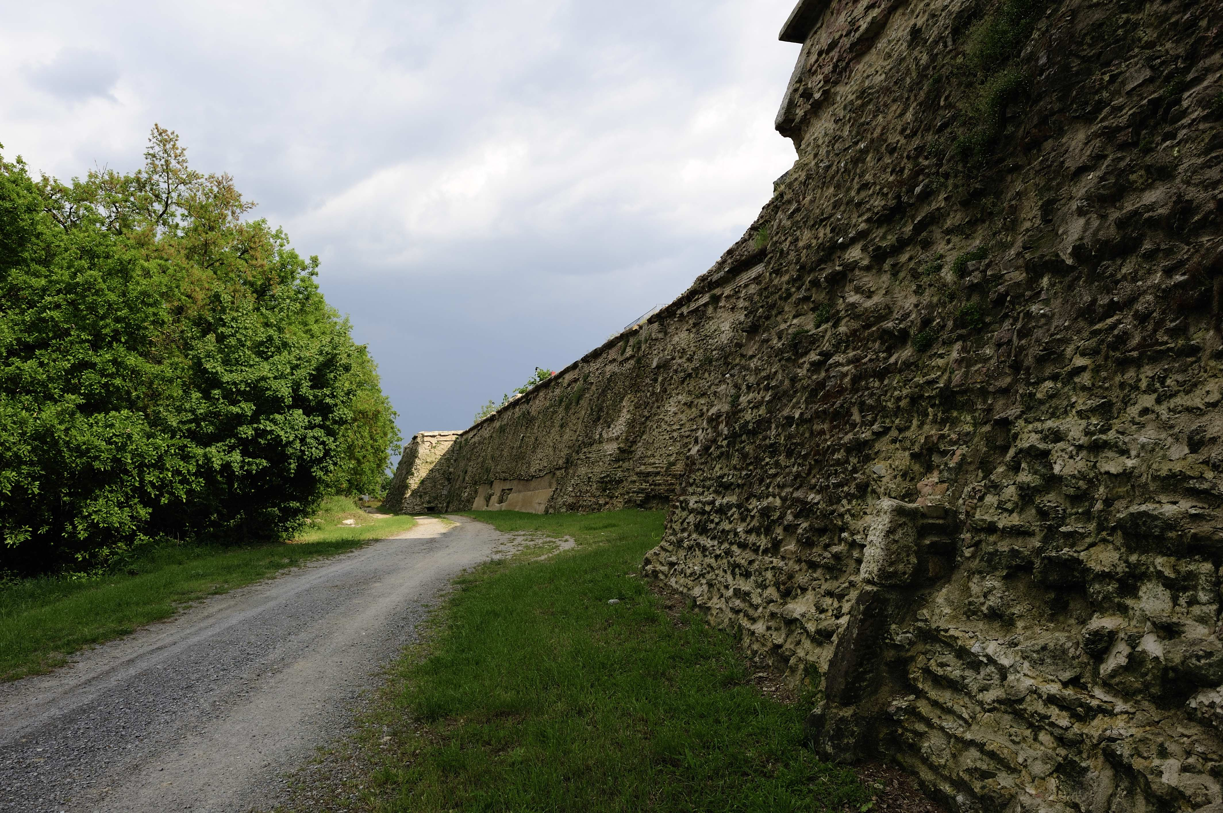 Fortezza medicea di Poggio Imperiale, fiancata - Poggibonsi - Siena